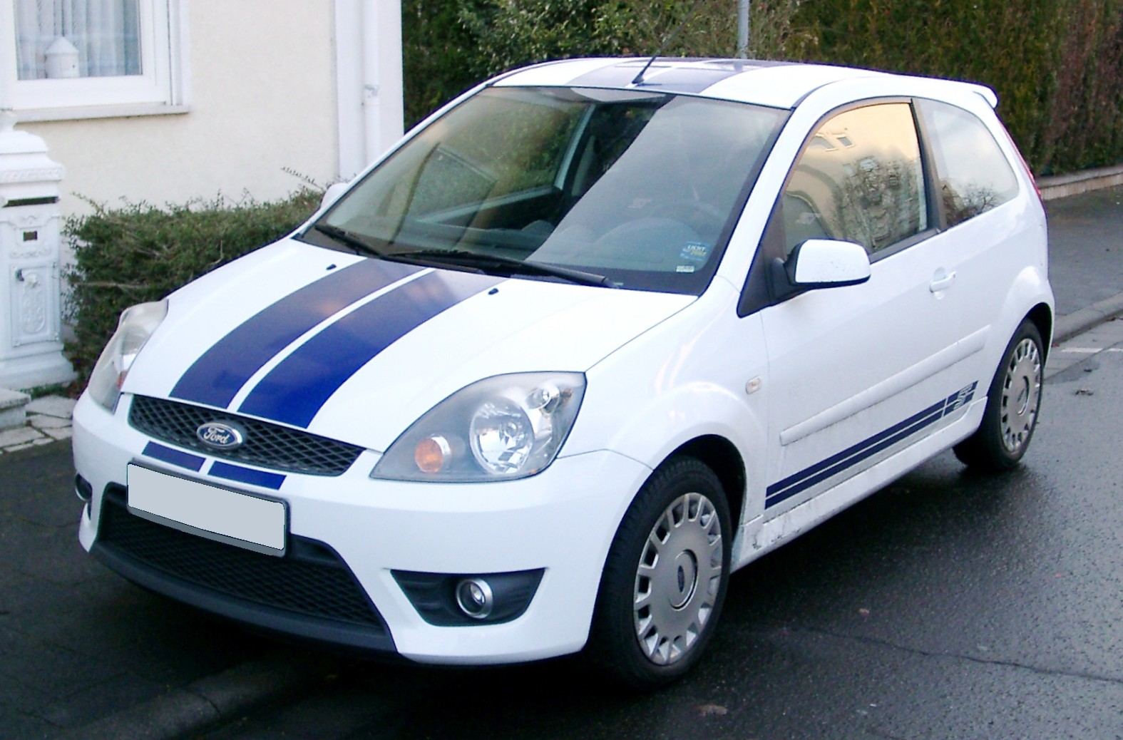 Ford Fiesta ST (MK5 facelit)